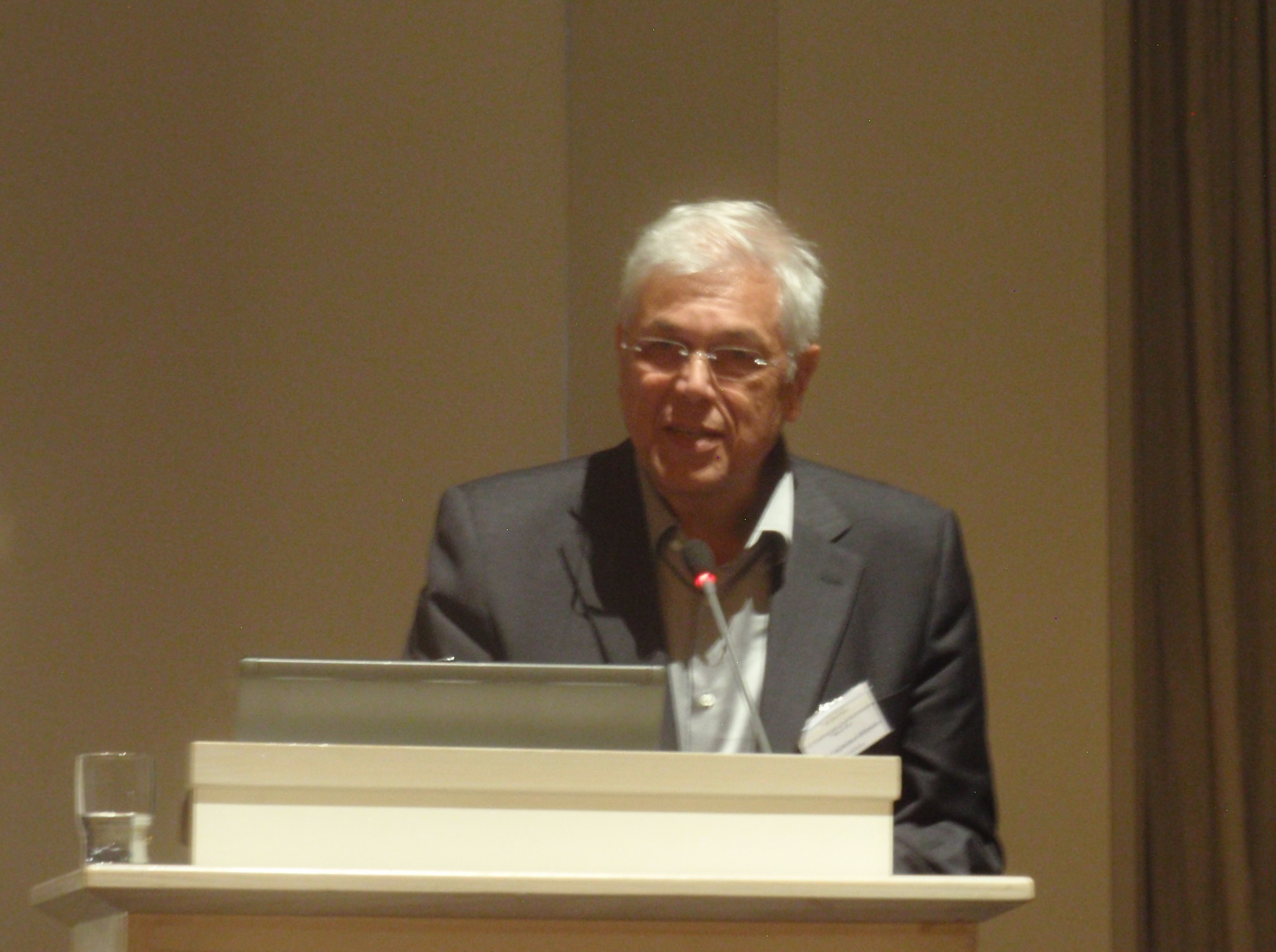 Dr. Phil. Michael Halhuber-Ahlmann (* 12.11.1947 in Innsbruck), Psychotherapeut in Berlin, auf dem Kongress "40 Jahre GwG" am 12. Juni 2010 in Mainz